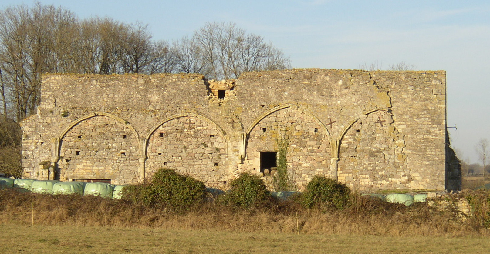 Ruines sud de l'ancienne chapelle des hôtes (XIIIème siècle), abbaye des Châtelliers. Etat 2007-2014.